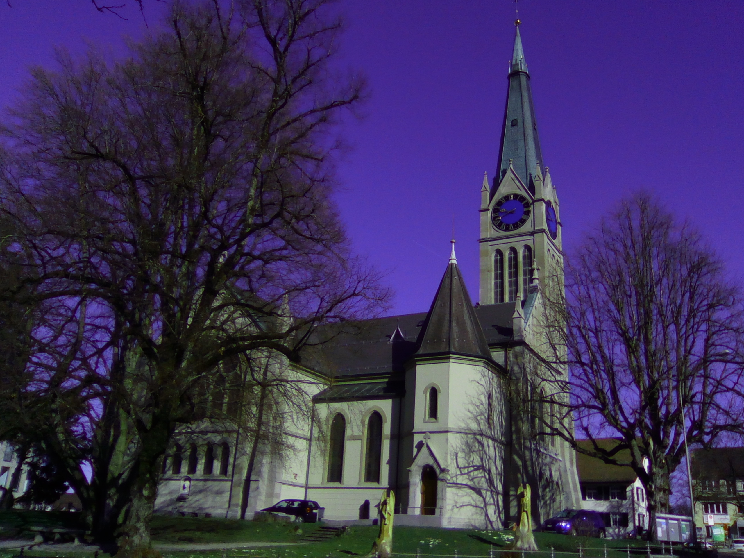 Reformierte Kirche Wetzikon